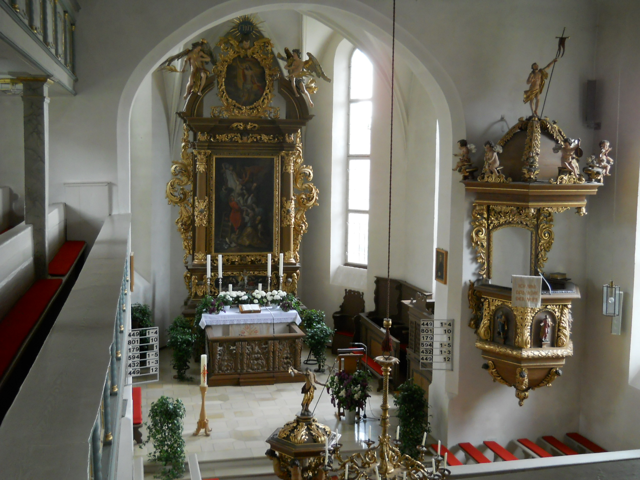 Dittenheim, Gemeinde im mittelfränkischen Landkreis Weißenburg-Gunzenhausen (Bayern), evang.-luth. Pfarrkirche St. Peter und Paul, Blick im Innern nach Osten